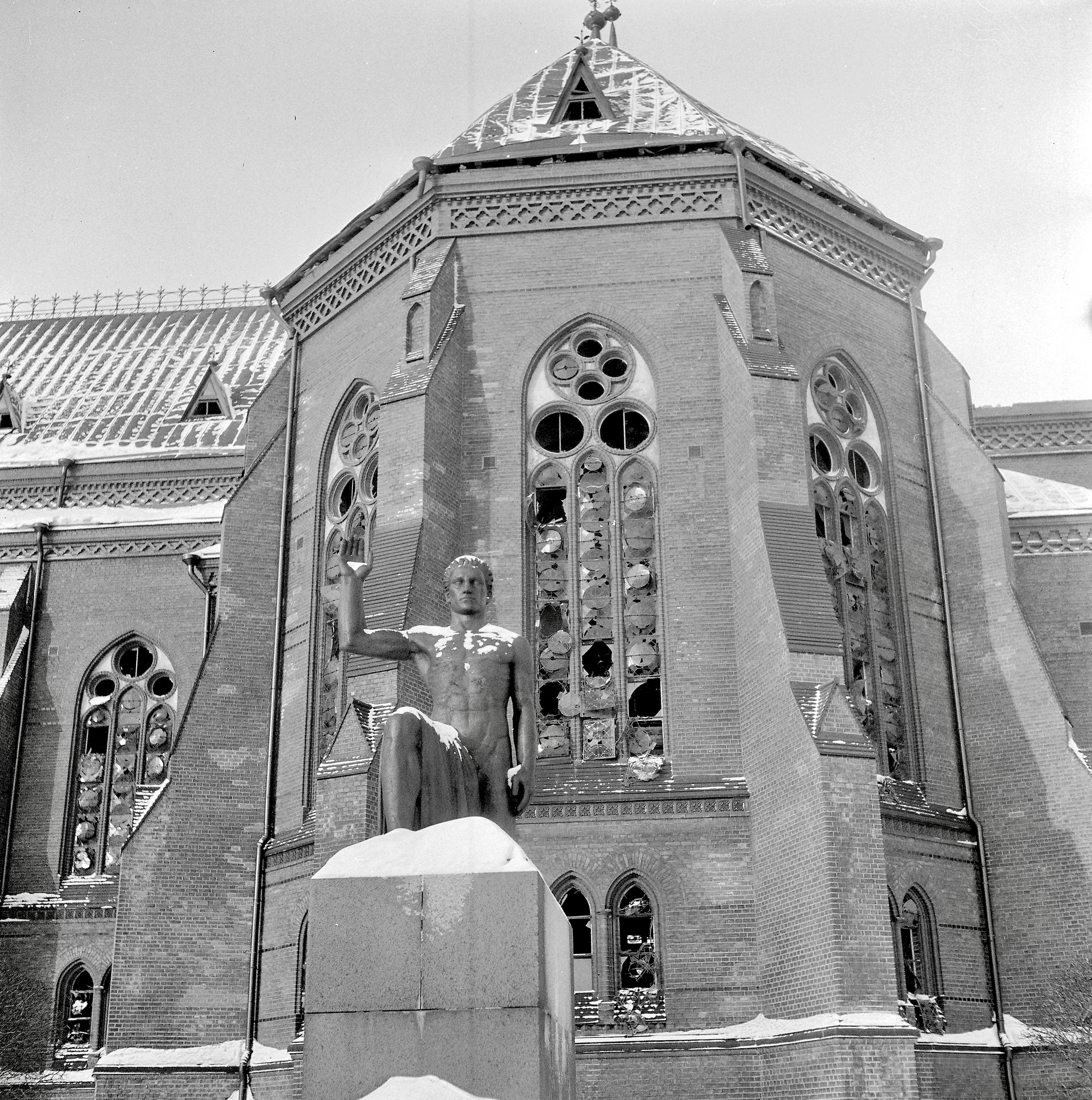 Выборгский кафедральный собор